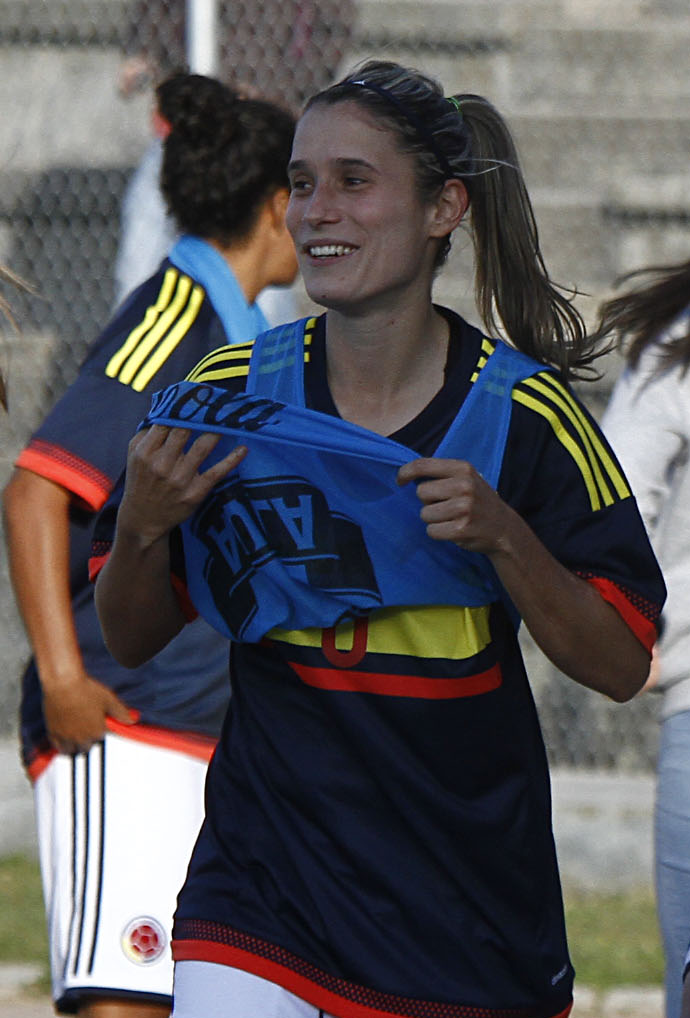 Tulcán, 11 abr (Andes).- La selección ecuatoriana de fútbol femenino perdió 4-1 este sábado en Tulcán (norte andino) ante Colombia en su tercer cotejo internacional preparatorio para el Mundial de Canadá. Foto: Micaela Ayala V./ANDES